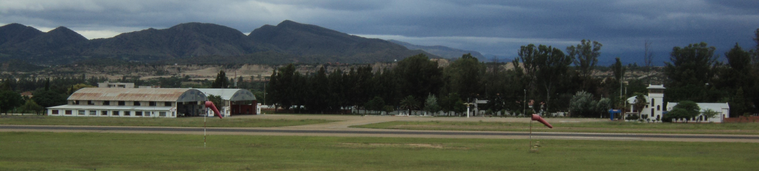 Instalaciones de la Fuerza Aérea Boliviana en Tarija